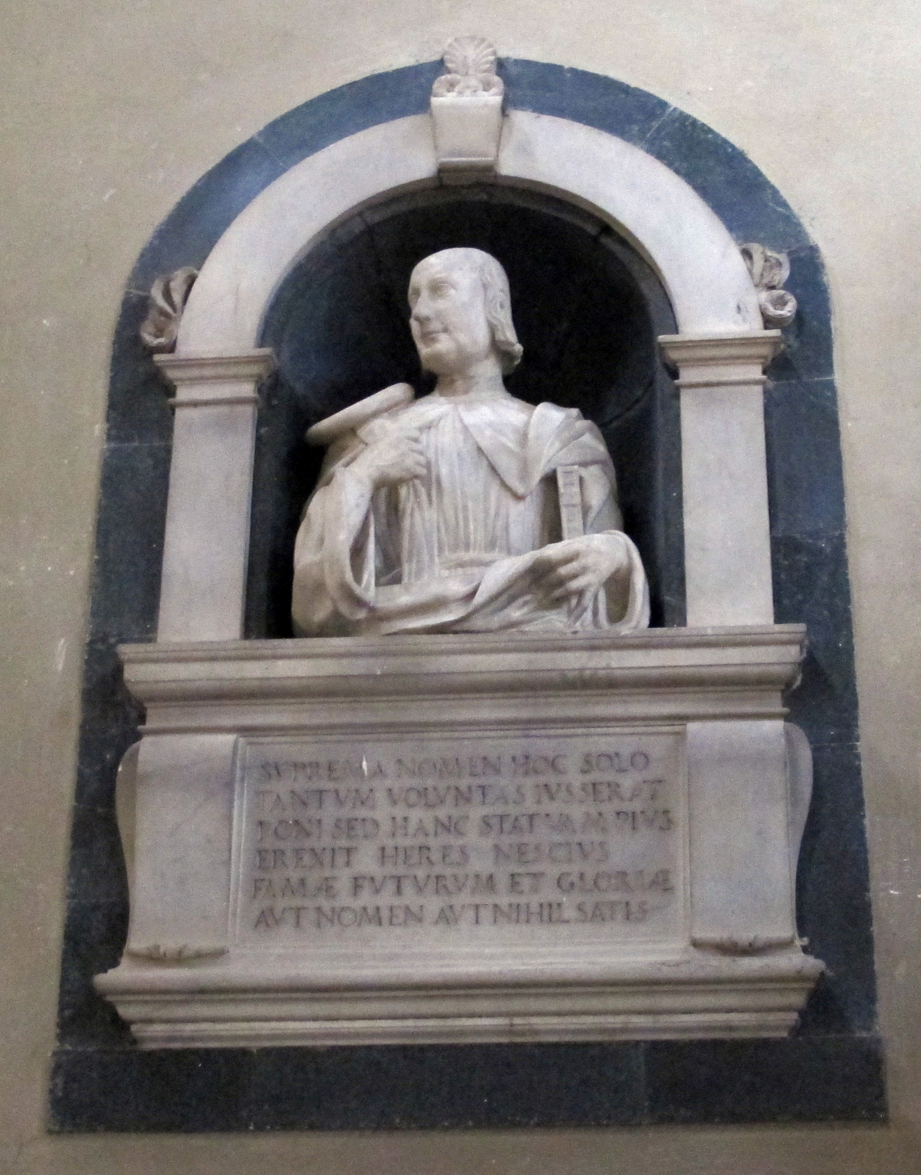 San Salvatore al Monte - Firenze